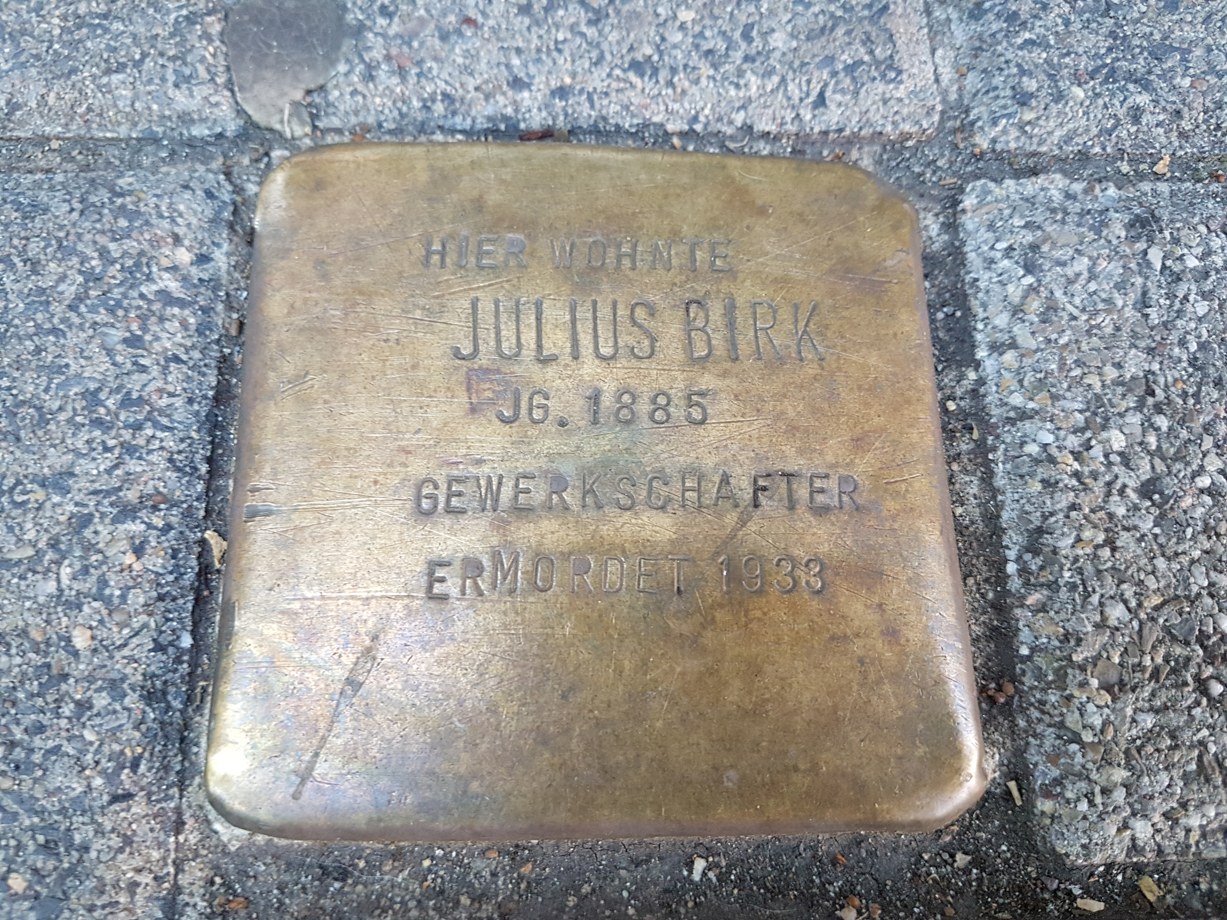 Stolperstein Duisburg Julius Birk